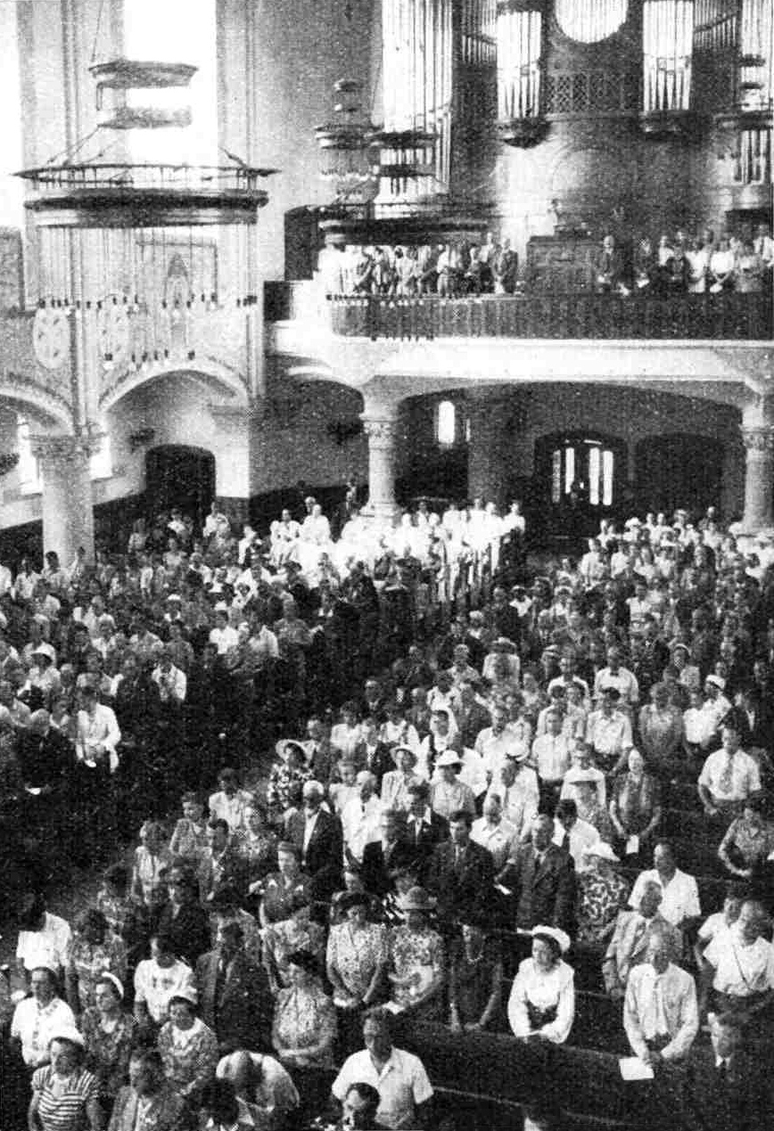 UK 1948. La evangelian diservon en la dimanĉa mateno vizitis multaj kongresanoj. Predikis paroliestro Edberg.